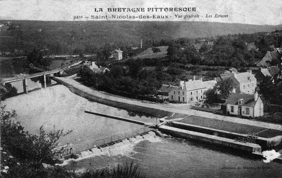 La gare vers 1900 : à gauche le pont sur le blavet et seul au centre le haut bâtiment voyageurs de la gare.